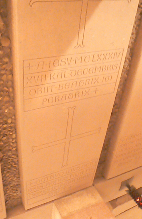 Beatrix von Burgund